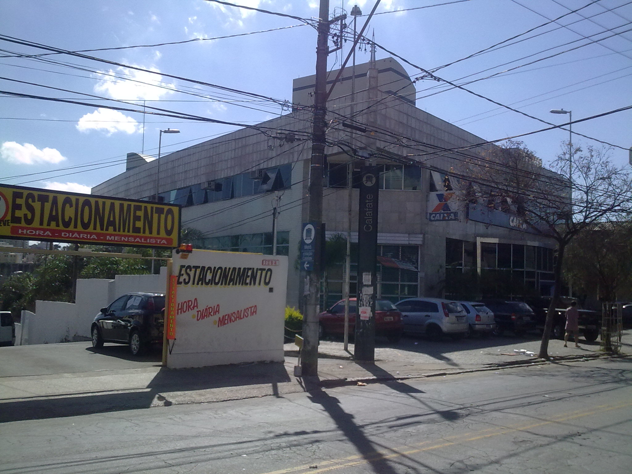 Entrada da estação de metrô Calafate, em Belo Horizonte, Brasil.